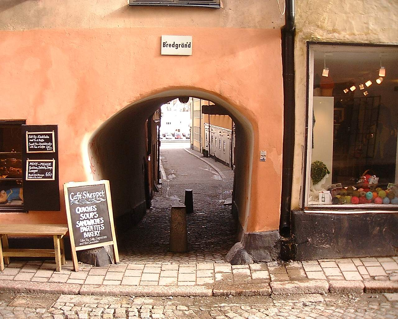 Bredgränd, Gamla stan, Stockholm.